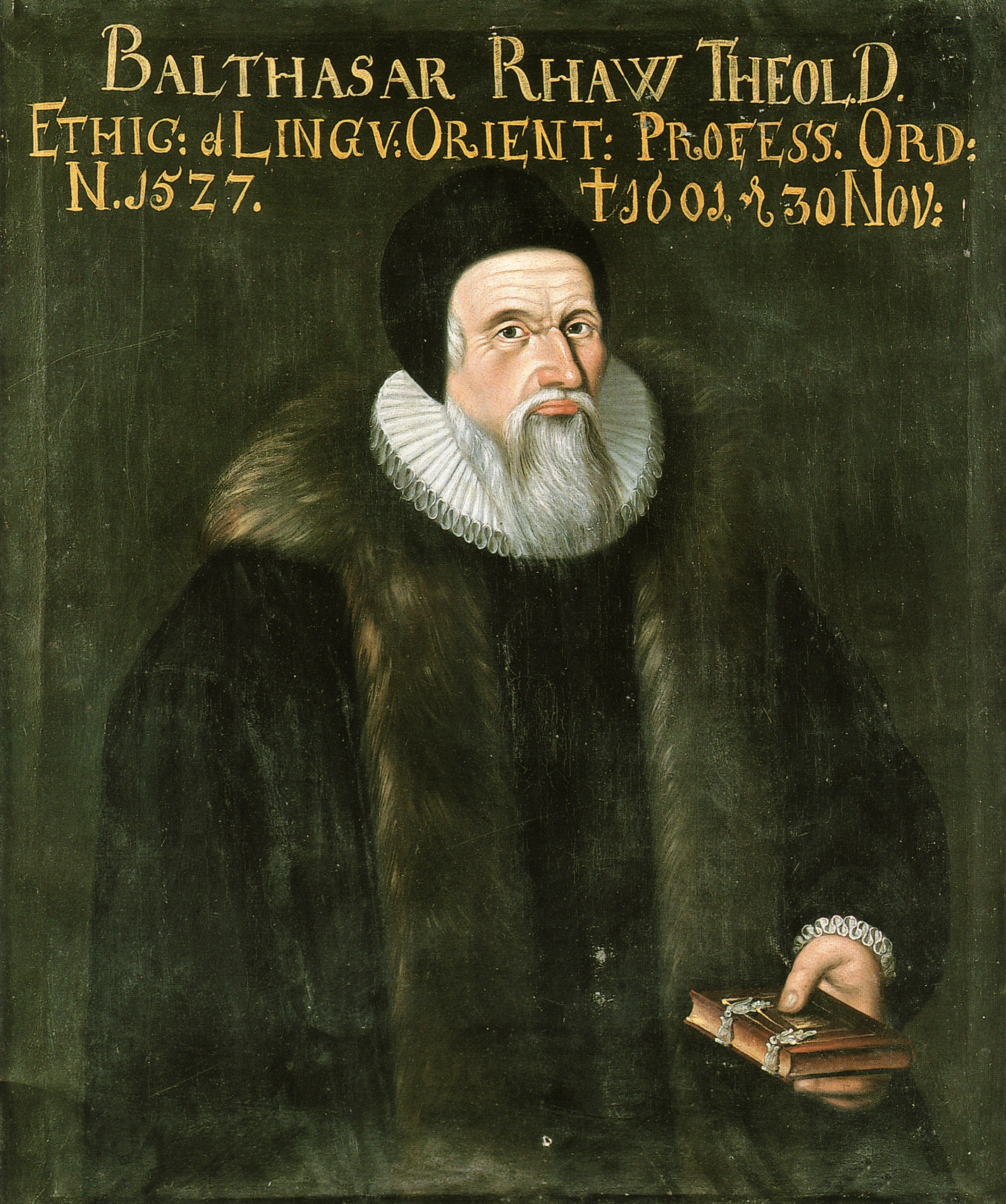 Ölgemälde von Balthasar Rhaw (I.).